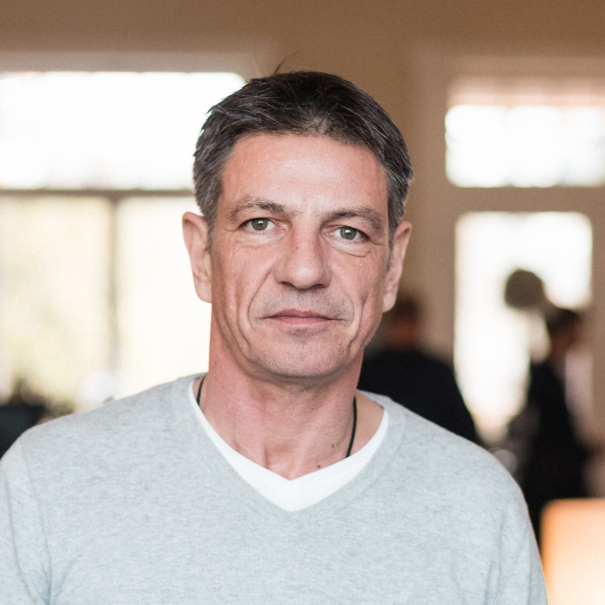 Dirk Kummer während Dreharbeiten 2020